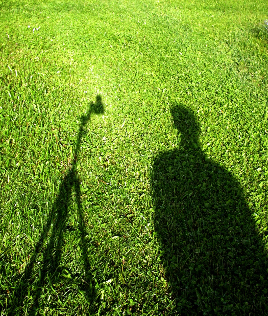 Pühasära kastesel rohul.